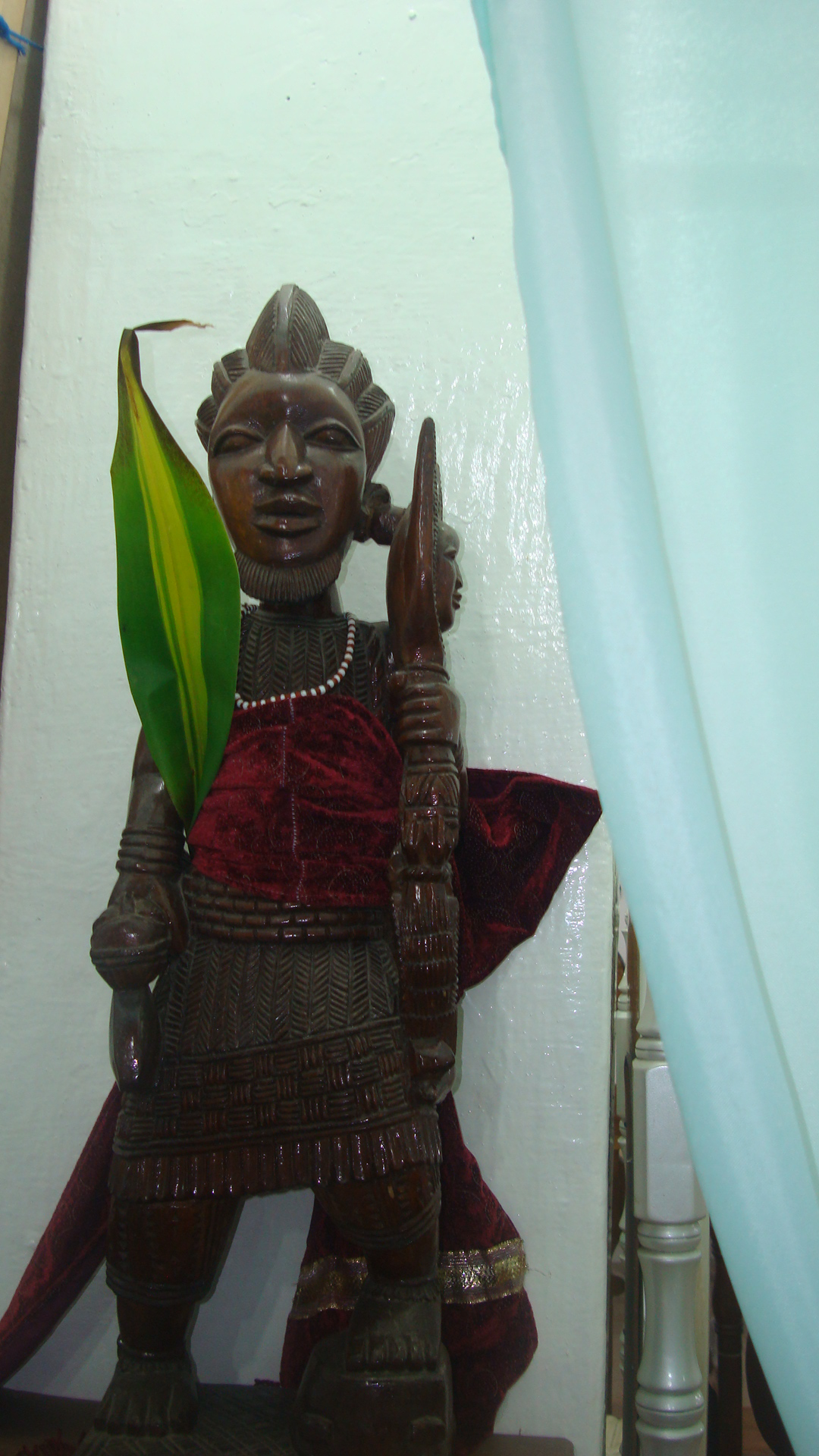 Escultura de Xango da casa branca, Orixa do candomblé